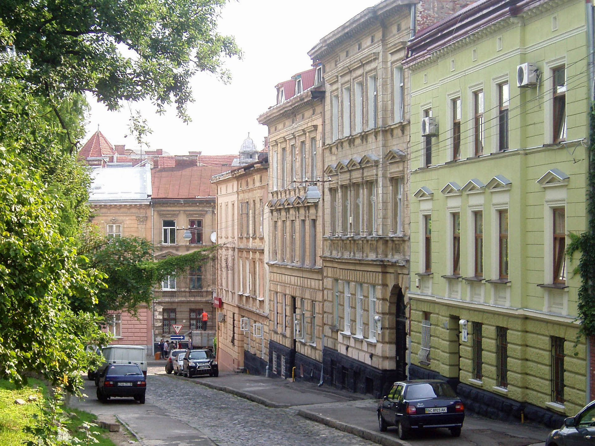 Початкова ділянка вулиці Кирила і Мефодія у Львові